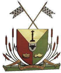 Blason stylé créé en 1990, avec devise (D'hommes et de marais entre sables et forêts)